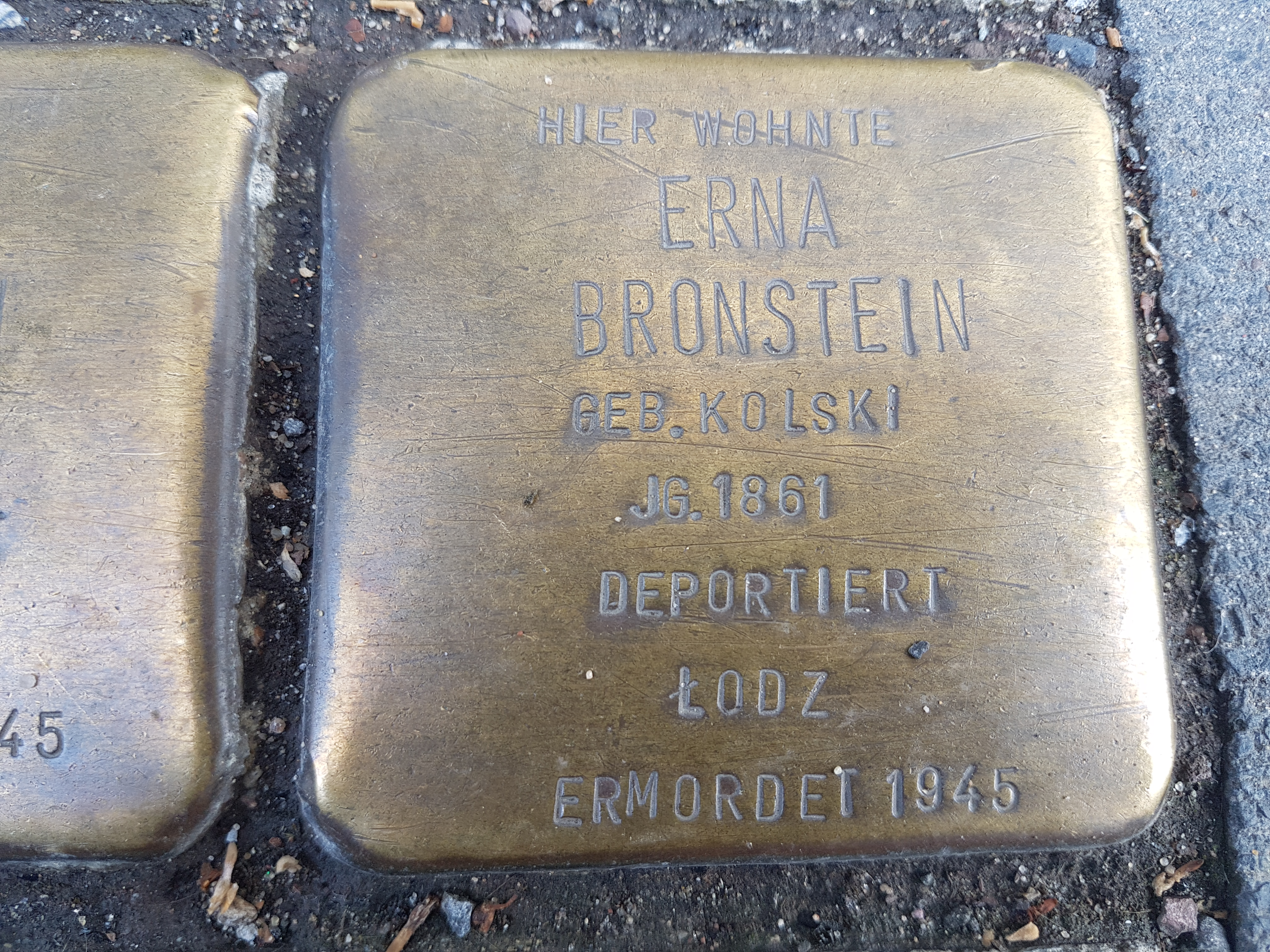 Stolperstein Duisburg Erna Bronstein